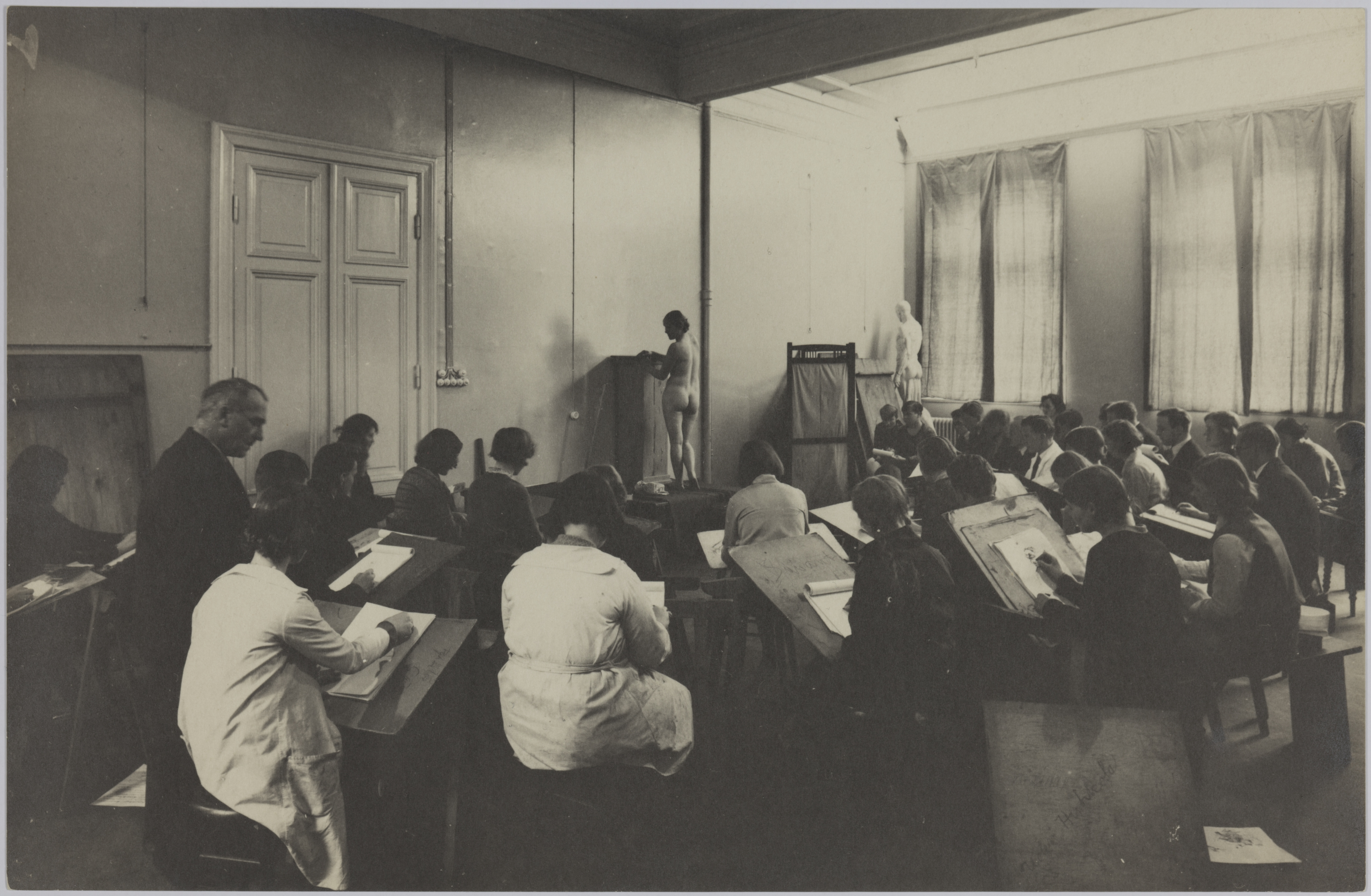 Elävän mallin piirustus, opetustilanne, 1920-luku. Taideteollisuuskeskuskoulun opetustilanteita. Aalto-yliopisto / Aalto University Tiedätkö lisää tästä kuvasta? Jätä kommentti tai ota yhteyttä sähköpostitse: Lisätietoja kuvakokoelmista / more information